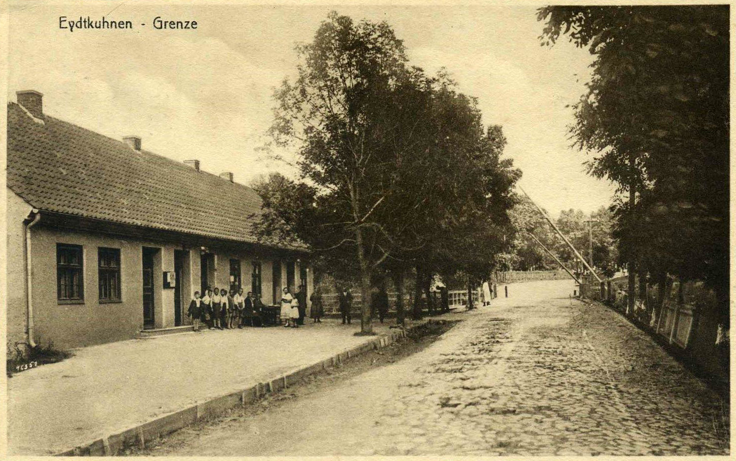 Eitkūnų pasienio perėjimo punktas XX a. pr. Kairėje matyti muitinės pastatas, tolumoje - pasienio tiltas.